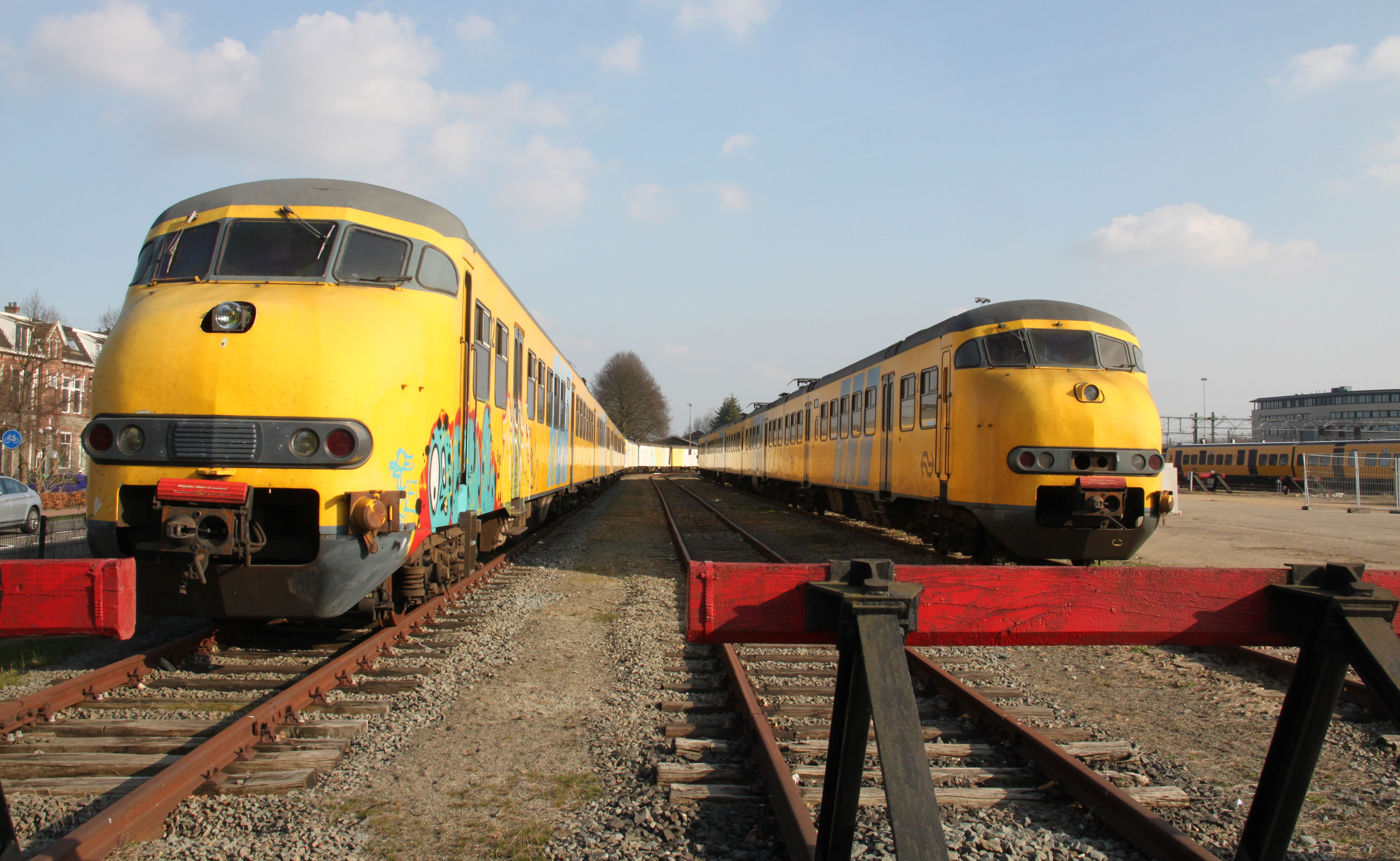 Twee treinstellen Plan T, de 527 en 529, staan buiten dienst ten westen van station Zwolle.